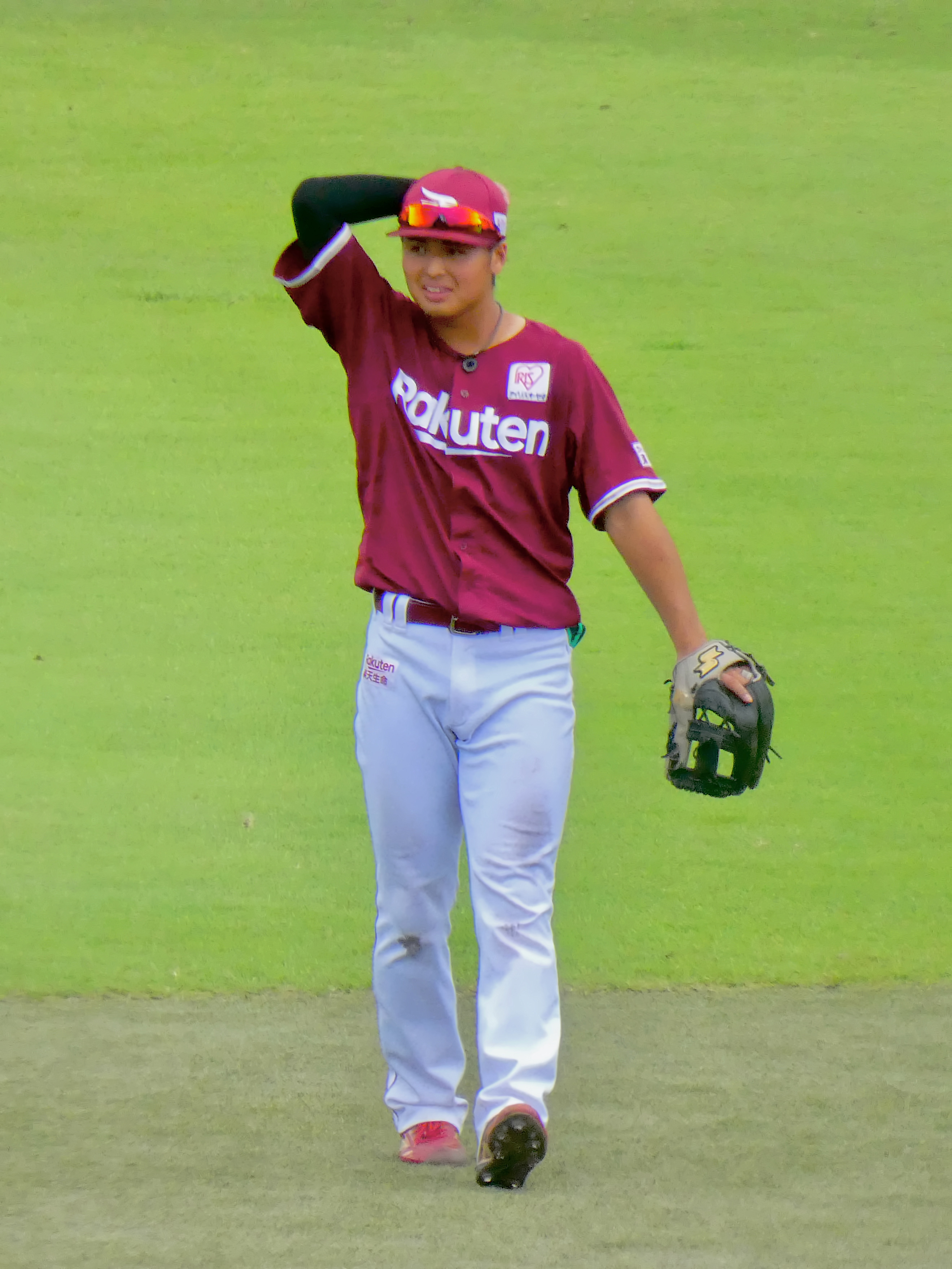 東北楽天ゴールデンイーグルスの選手「黒川史陽」。ヤクルト戸田球場にて。